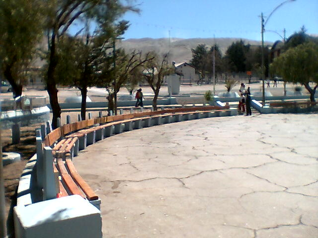 Xhuquicamat el dia de su despedida